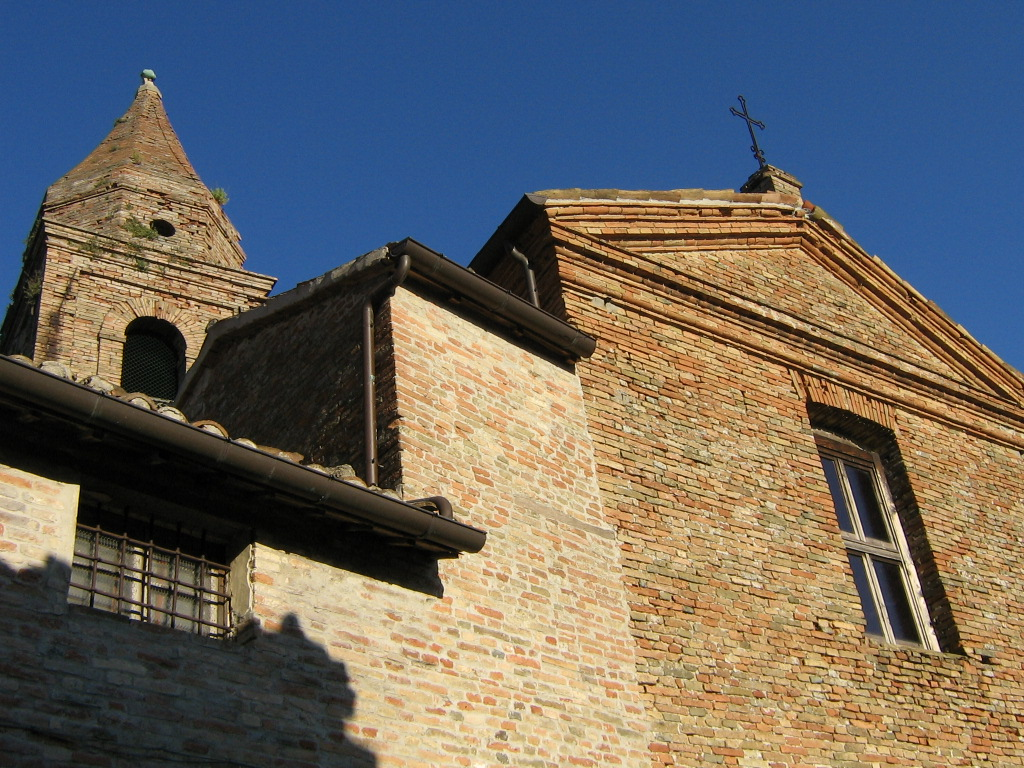 Chiesa del convento delle Clarisse, Mondaino (RN), Italy